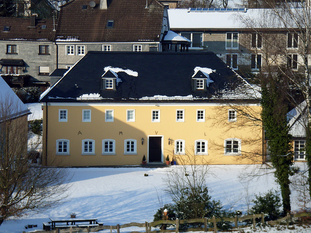 Sotterbach Castle, Reichshof, North Rhine-Westphalia, Germany (south side)